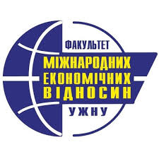 Символ факультету мев